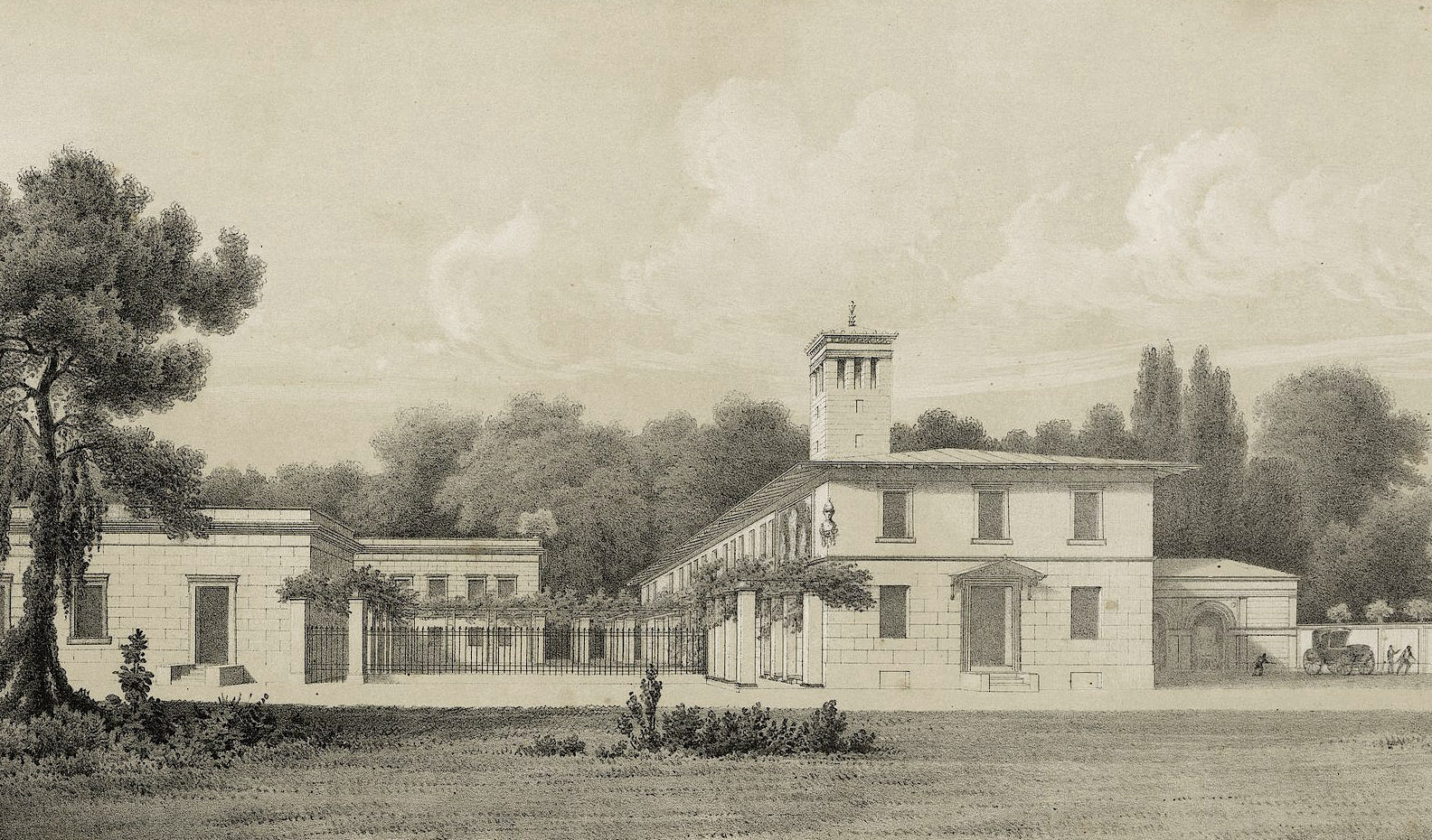 Vorfahrt am Schloss Glienicke, Veröffentlichung von Schinkel